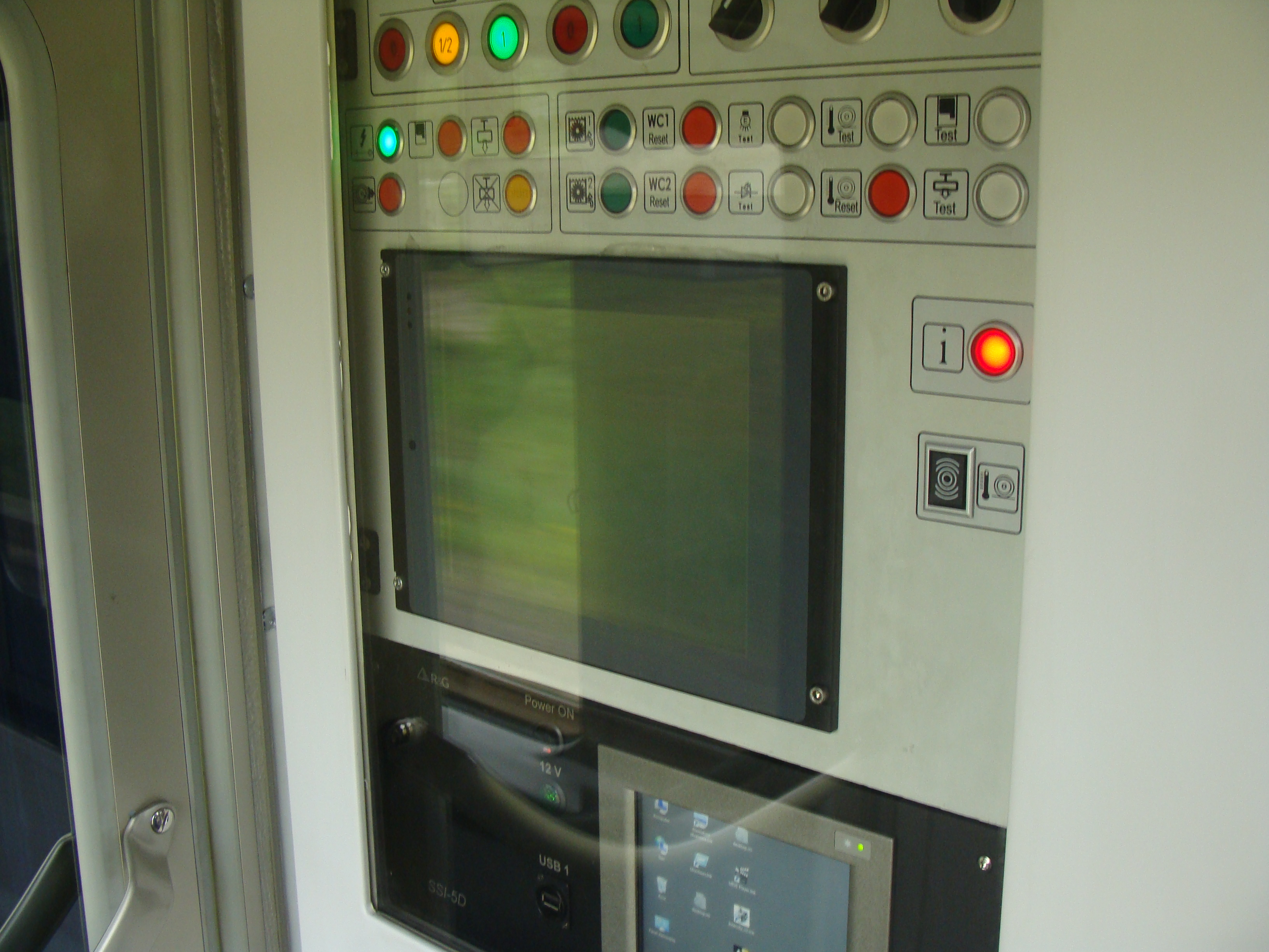 Szafa sterownicza w wagonie typu 166A